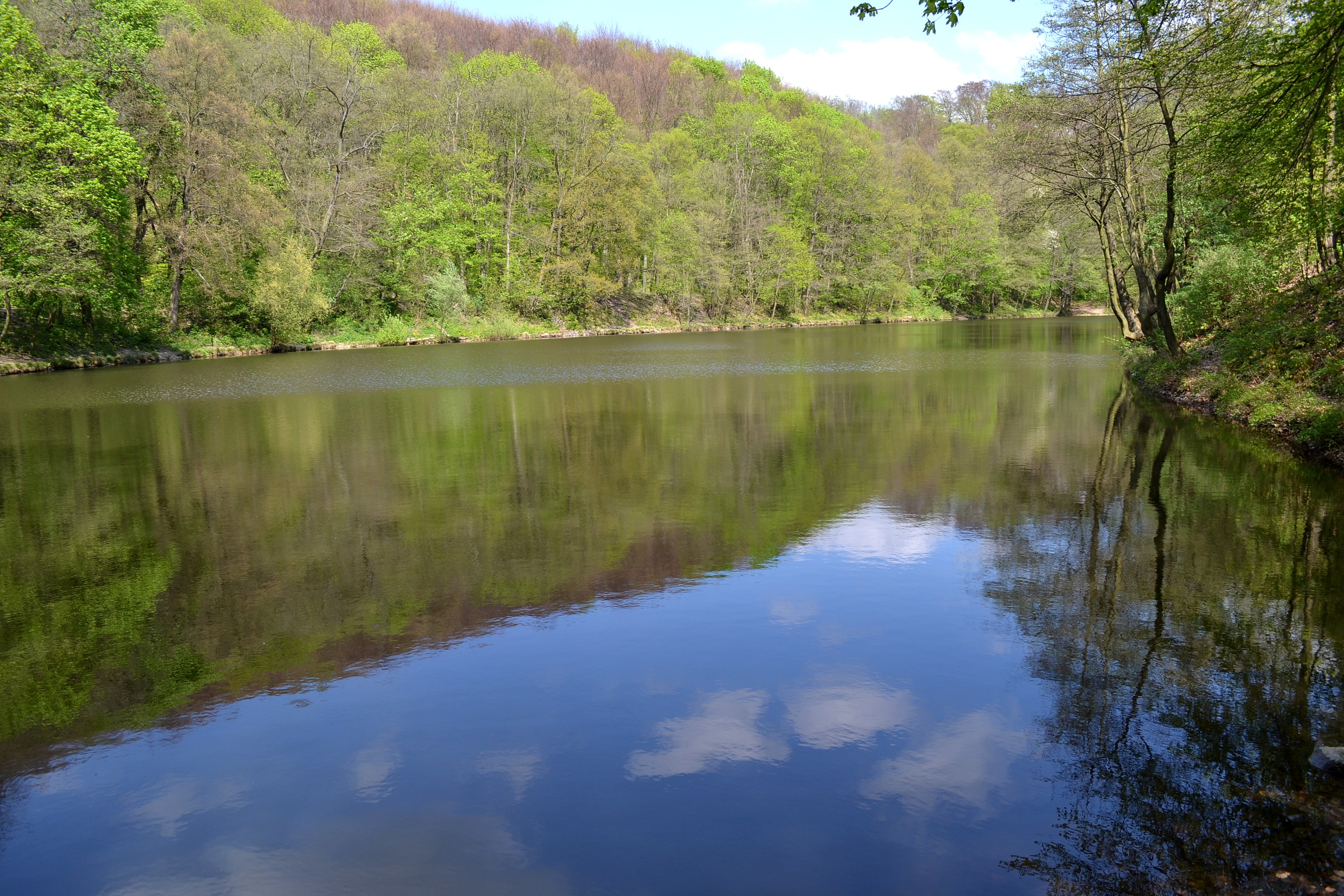 Mlynská dolina. Druhé jazero